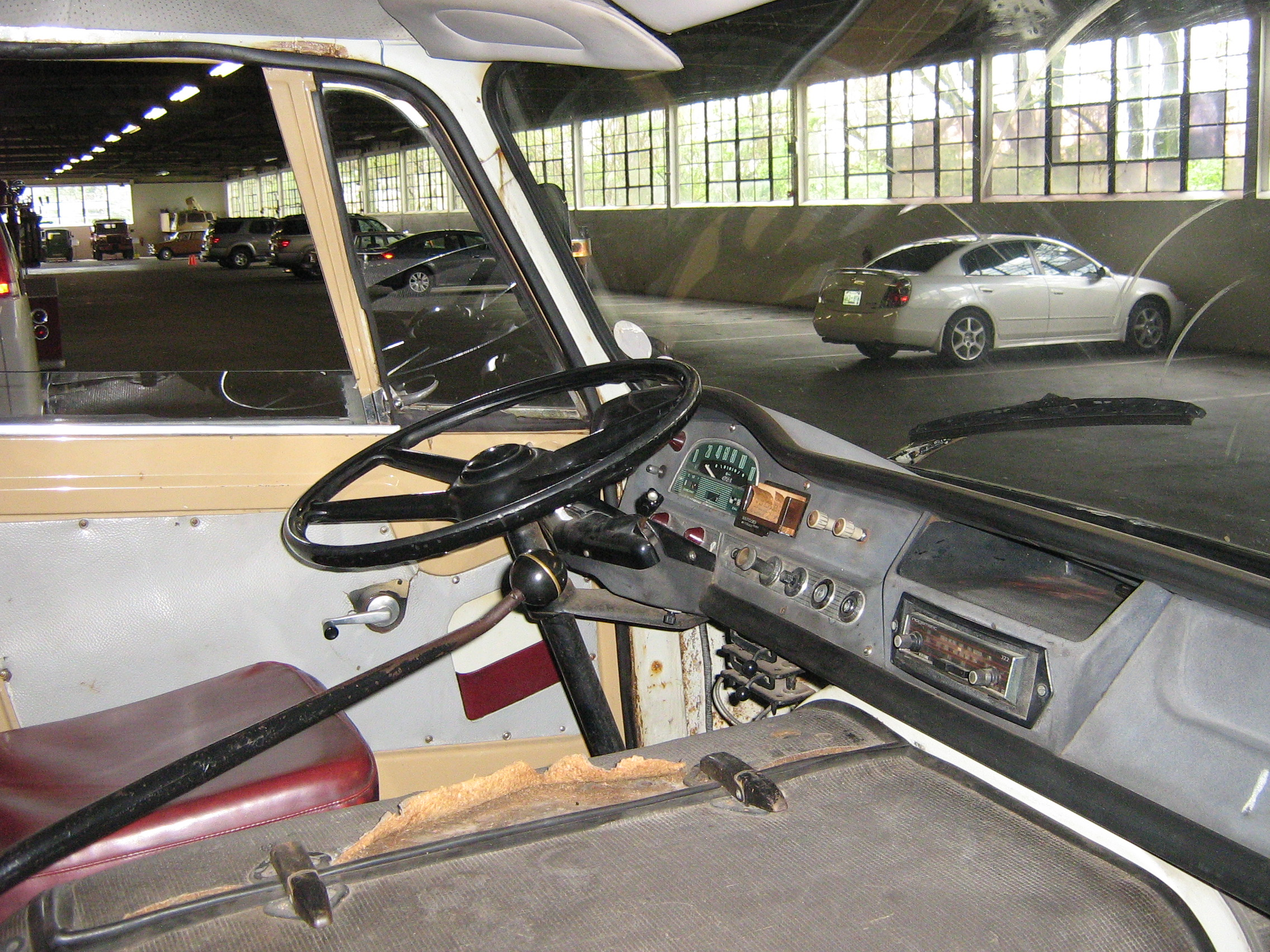 1968 Citroen Type 350